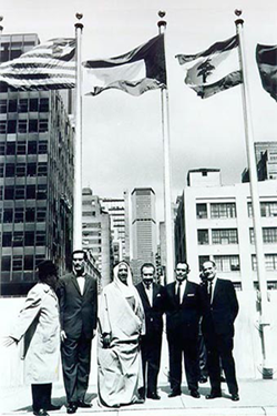 رفع علم دولة الكويت لأوّل مرة أمام مبنى منظمة الأمم المتحدة في نيويورك في العام 1963. وكالة الأنباء الكويتية (كونا). Hoisting Kuwait's flag outside the United Nation's building in 1963. Kuwait News Agency (KUNA).